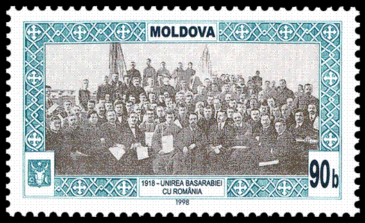 Marcă poştală emisă în 1998 în Republica Moldova cu ocazia aniversării a 80 de ani de la unirea Basarabiei cu România.